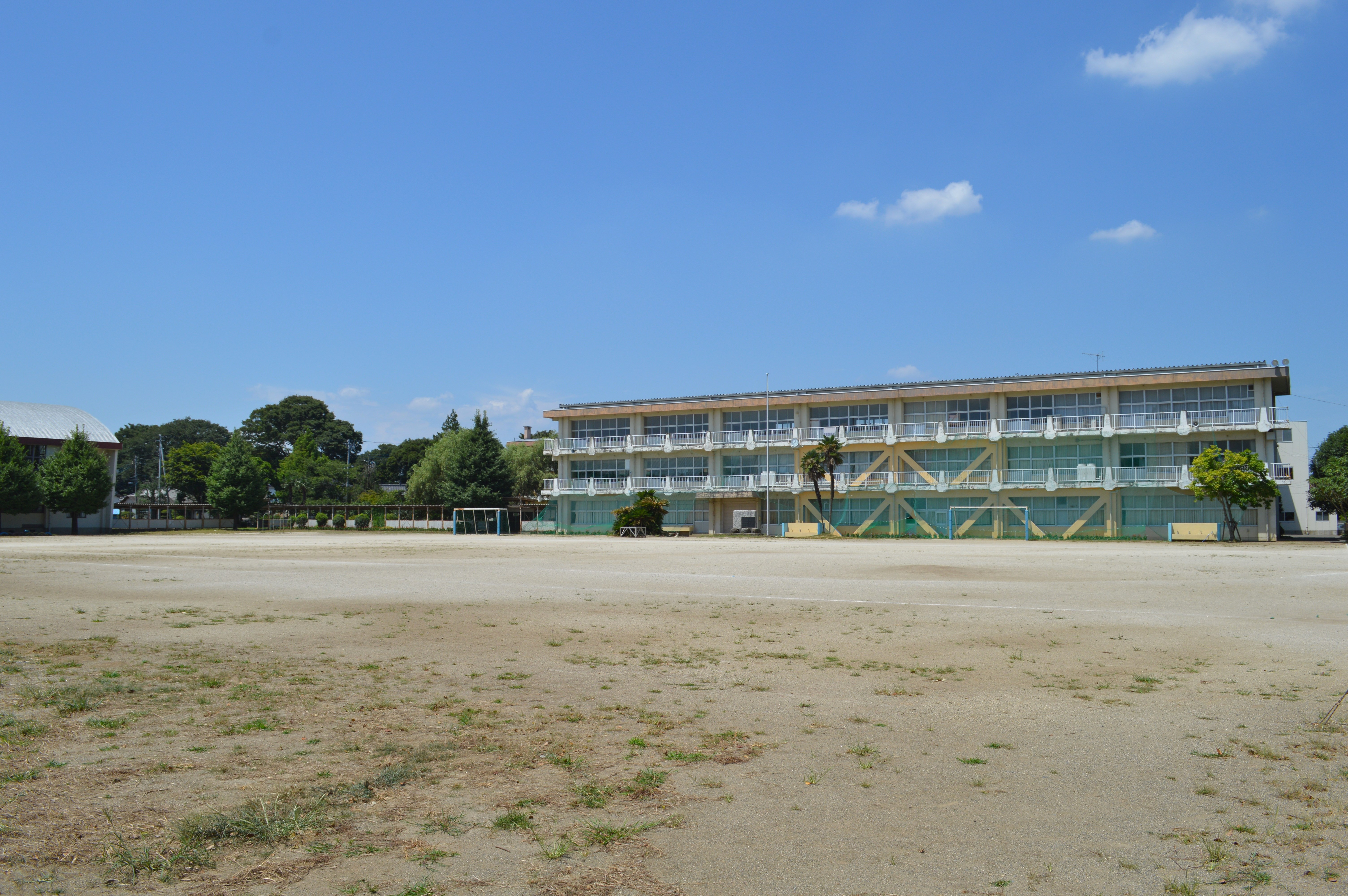 常陸国府跡 全景 (石岡小学校校庭)